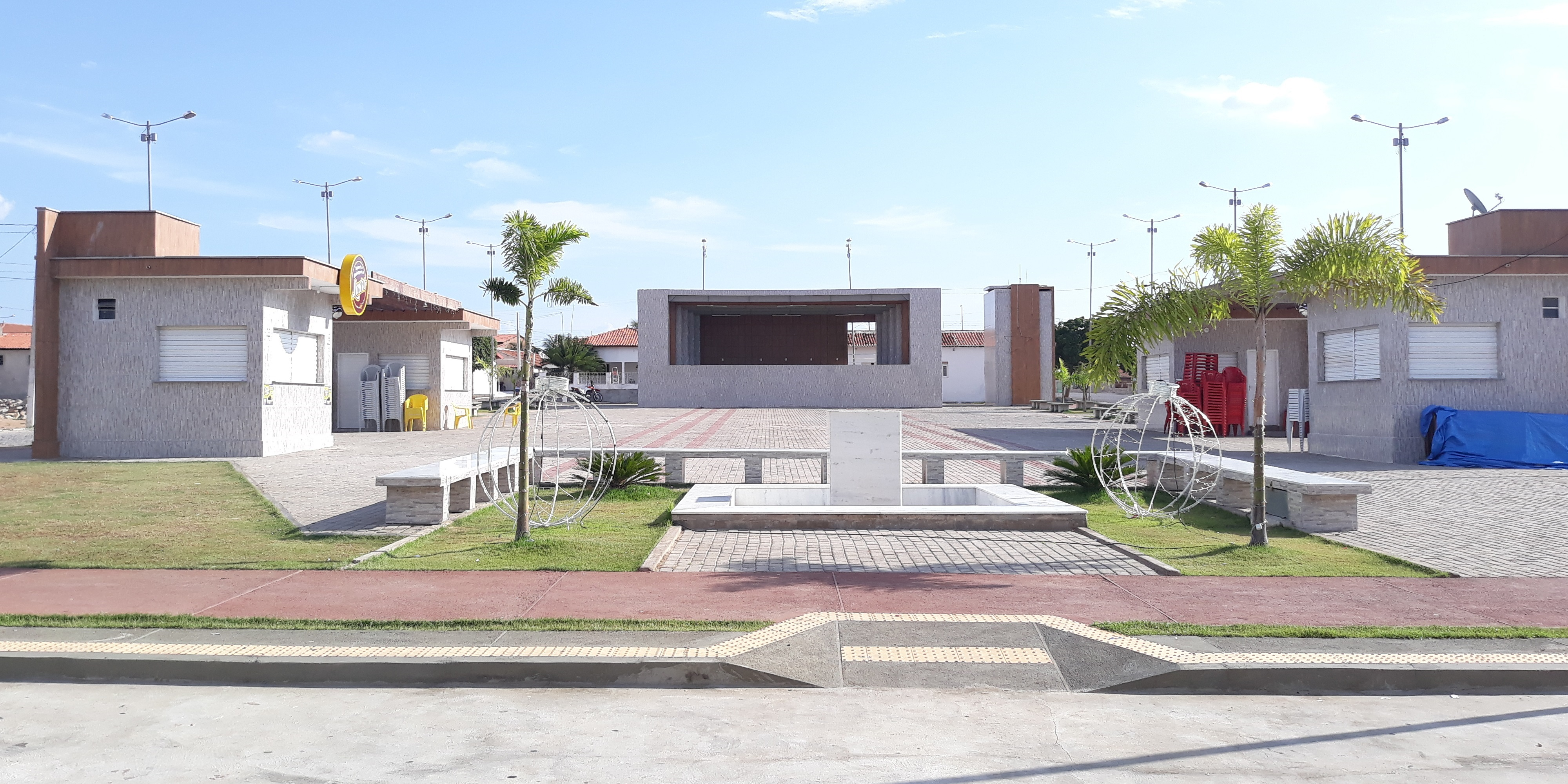 Praça de Eventos Sérgio Dantas em Francisco Dantas, Rio Grande do Norte, Brasil